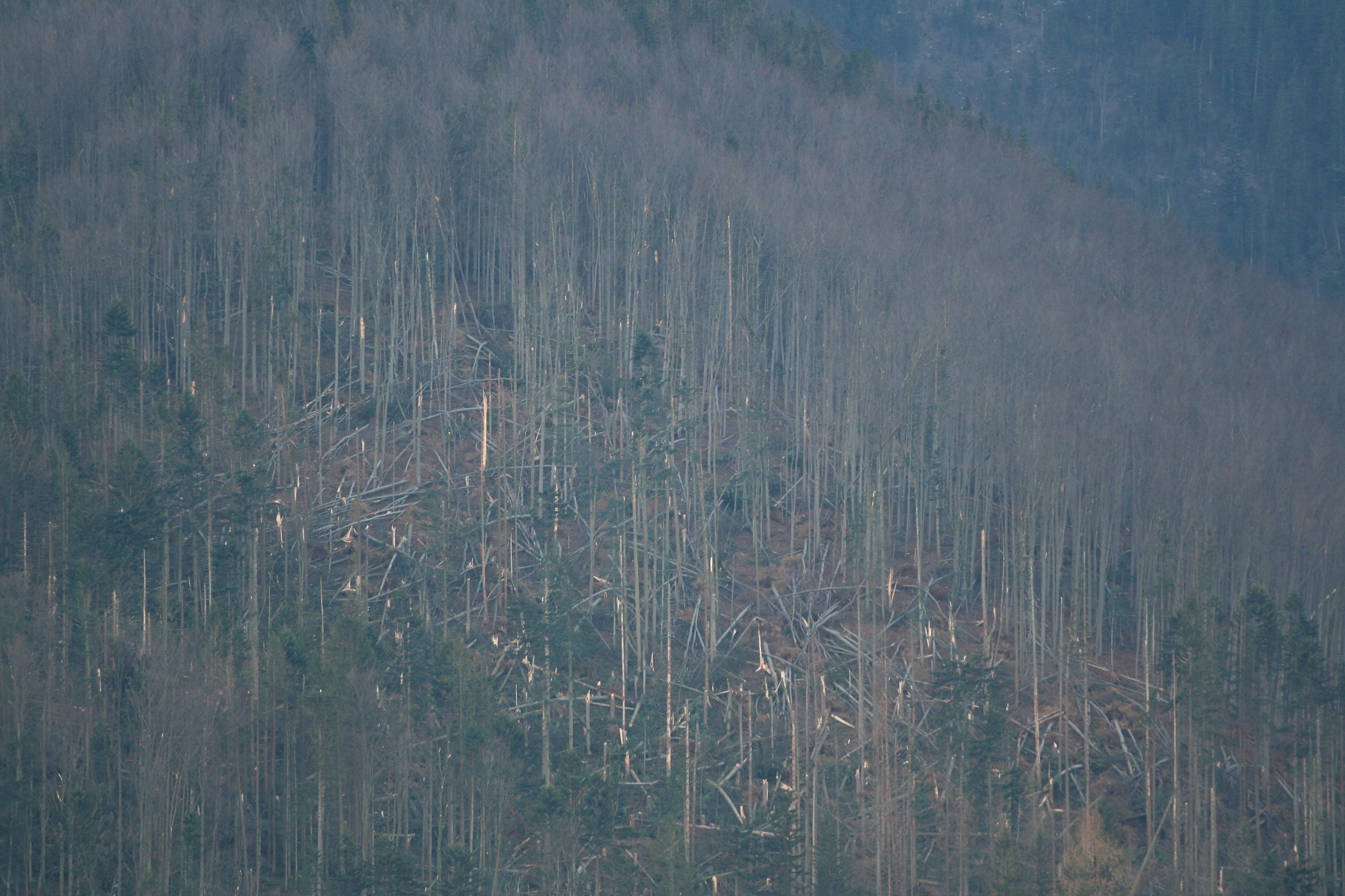 Połamane drzewa w Tatrach po halnym 24 grudnia 2013 roku